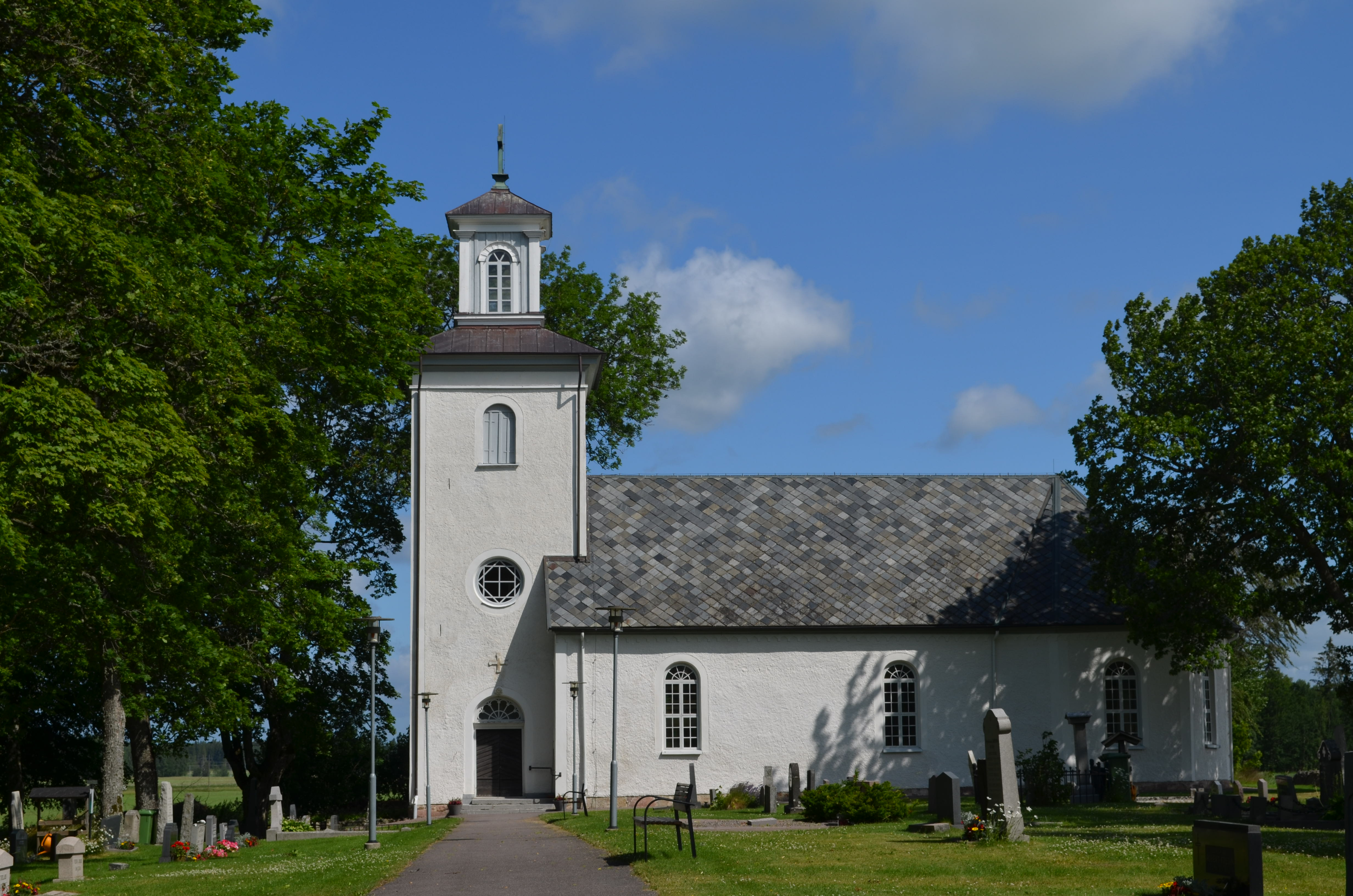 Mo kyrka